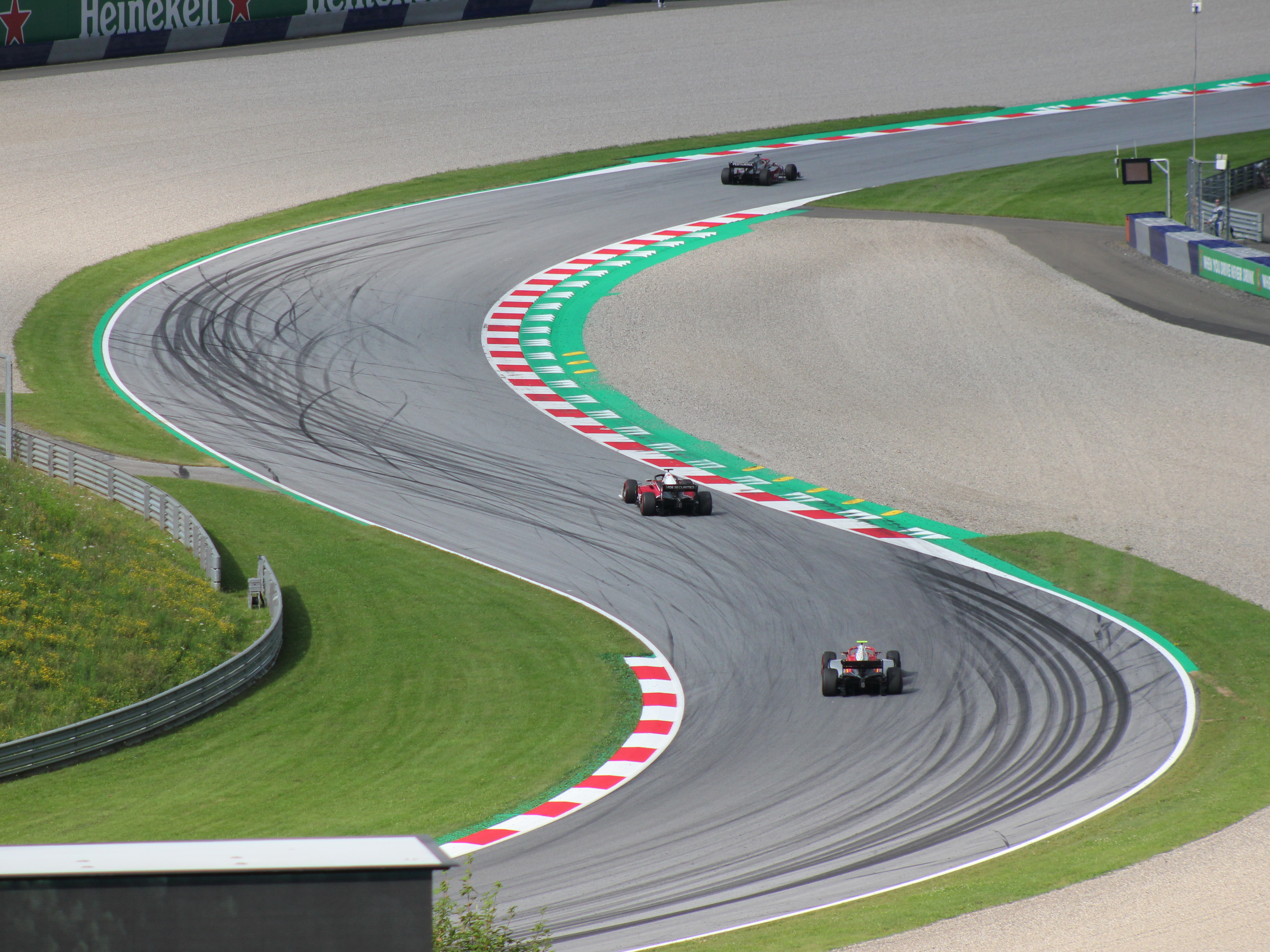 Eine Szene aus dem Qualifying zum ersten Rennen